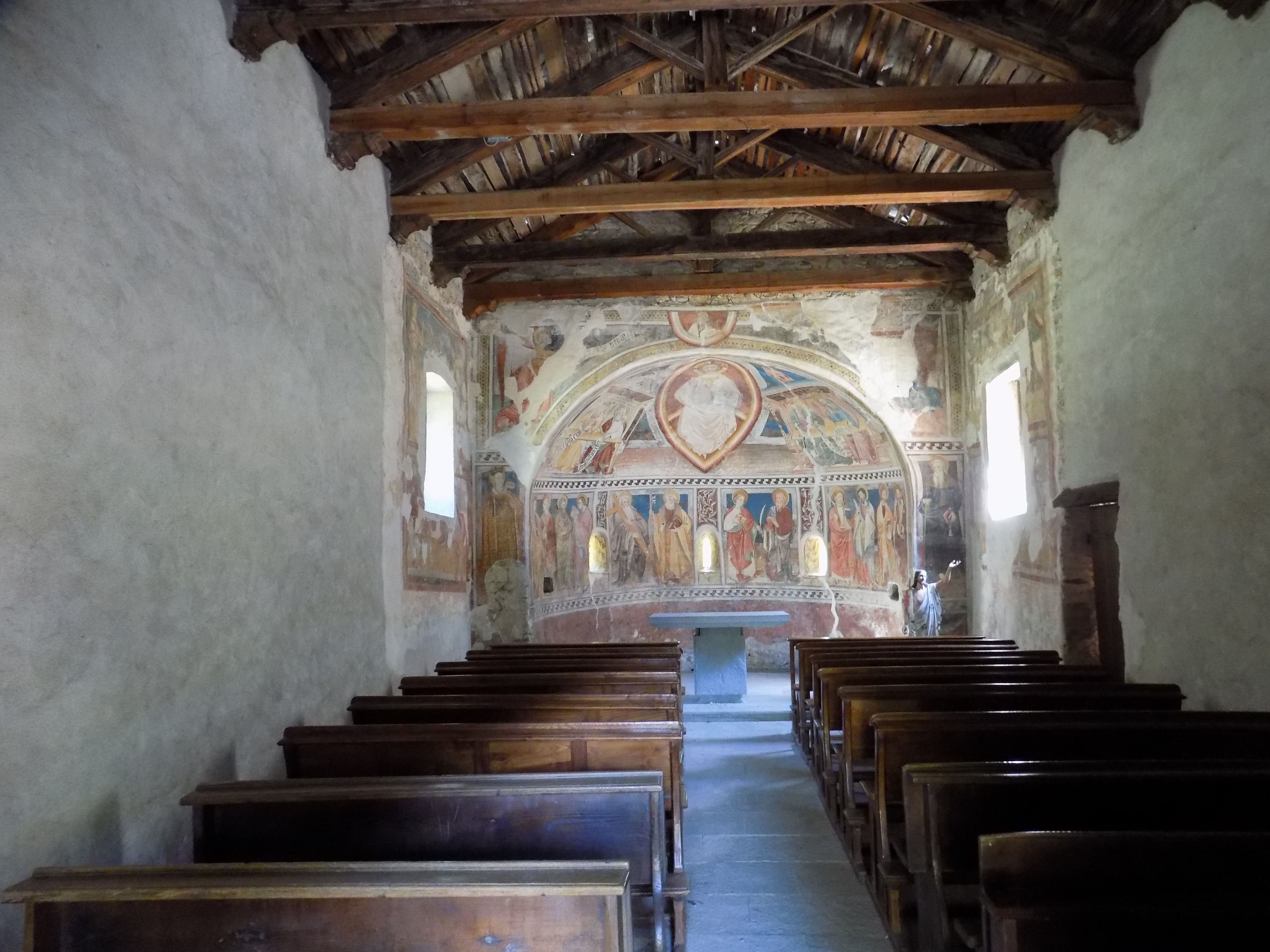 Alte Valli Stura e Maira (Q47364759)